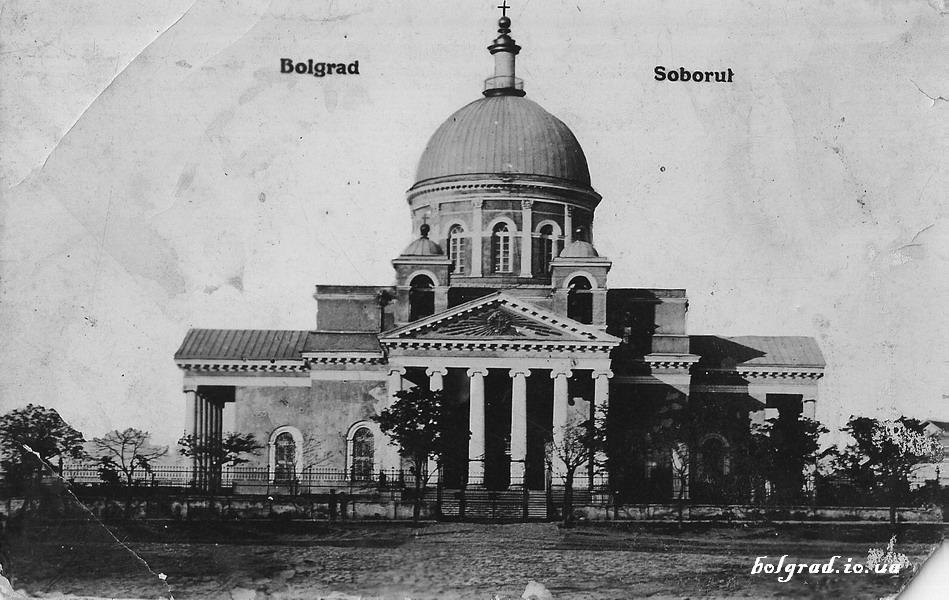 Свято-Преображенський собор у Болграді. Архівне фото